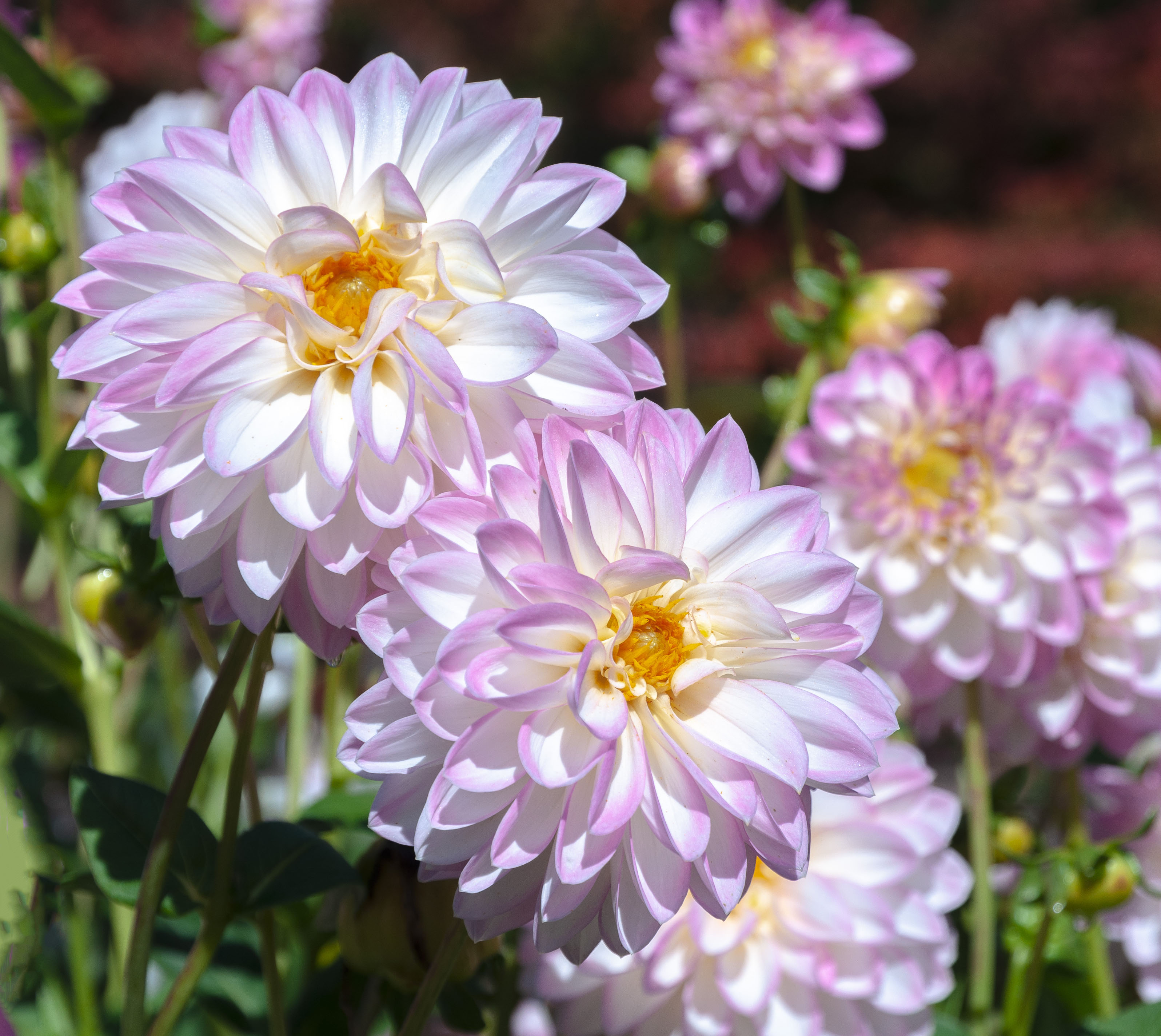 Dahlia x Pinnata du jardin des tulipes et des dahlias du zoo de Mulhouse.